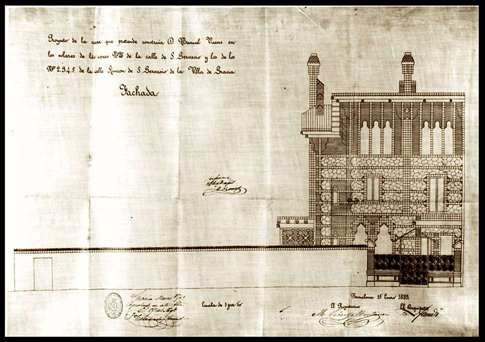 Fachada de la Casa Vicens, de Antoni Gaudí (1883).